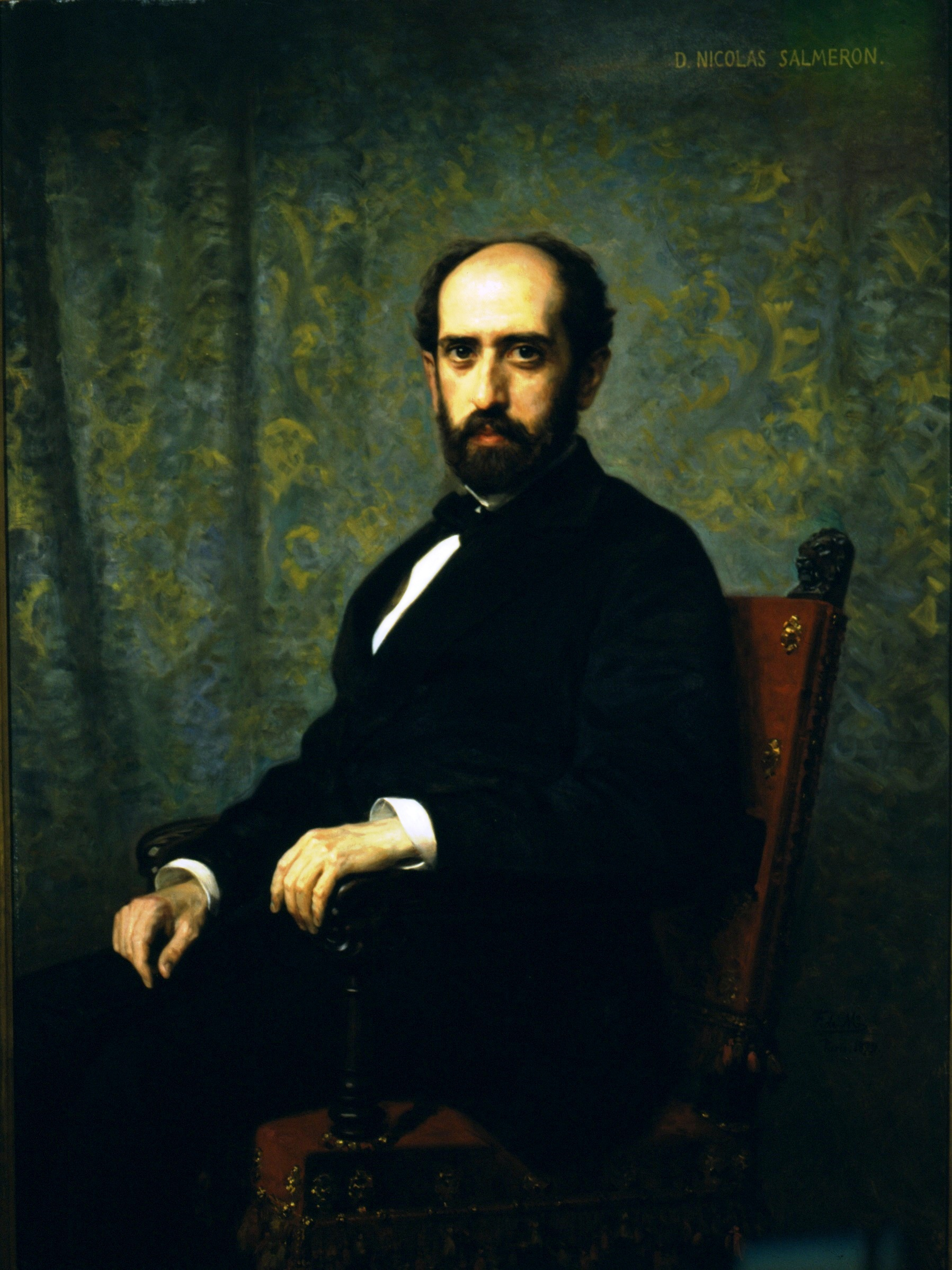 Retrato del político español Nicolás Salmerón (1838-1908), que fue uno de los cuatro presidentes de la Primera República Española.